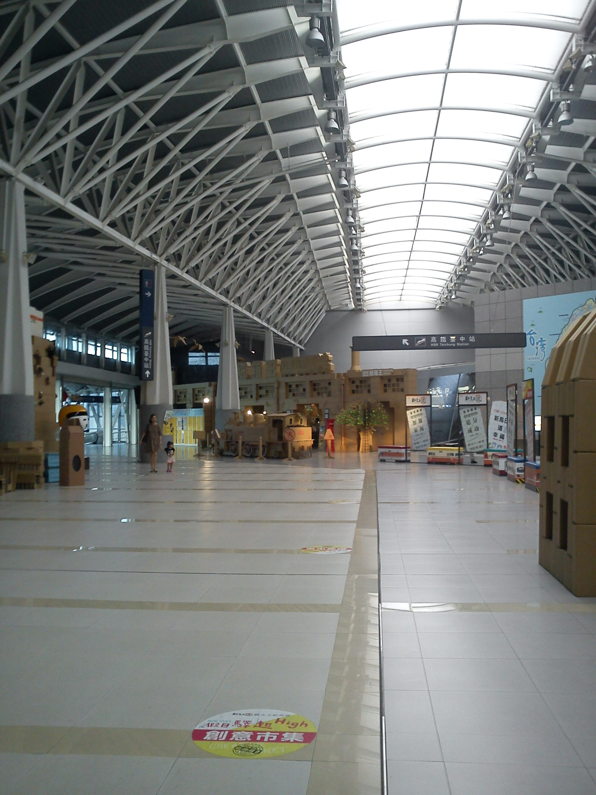 臺鐵新烏日站大廳。